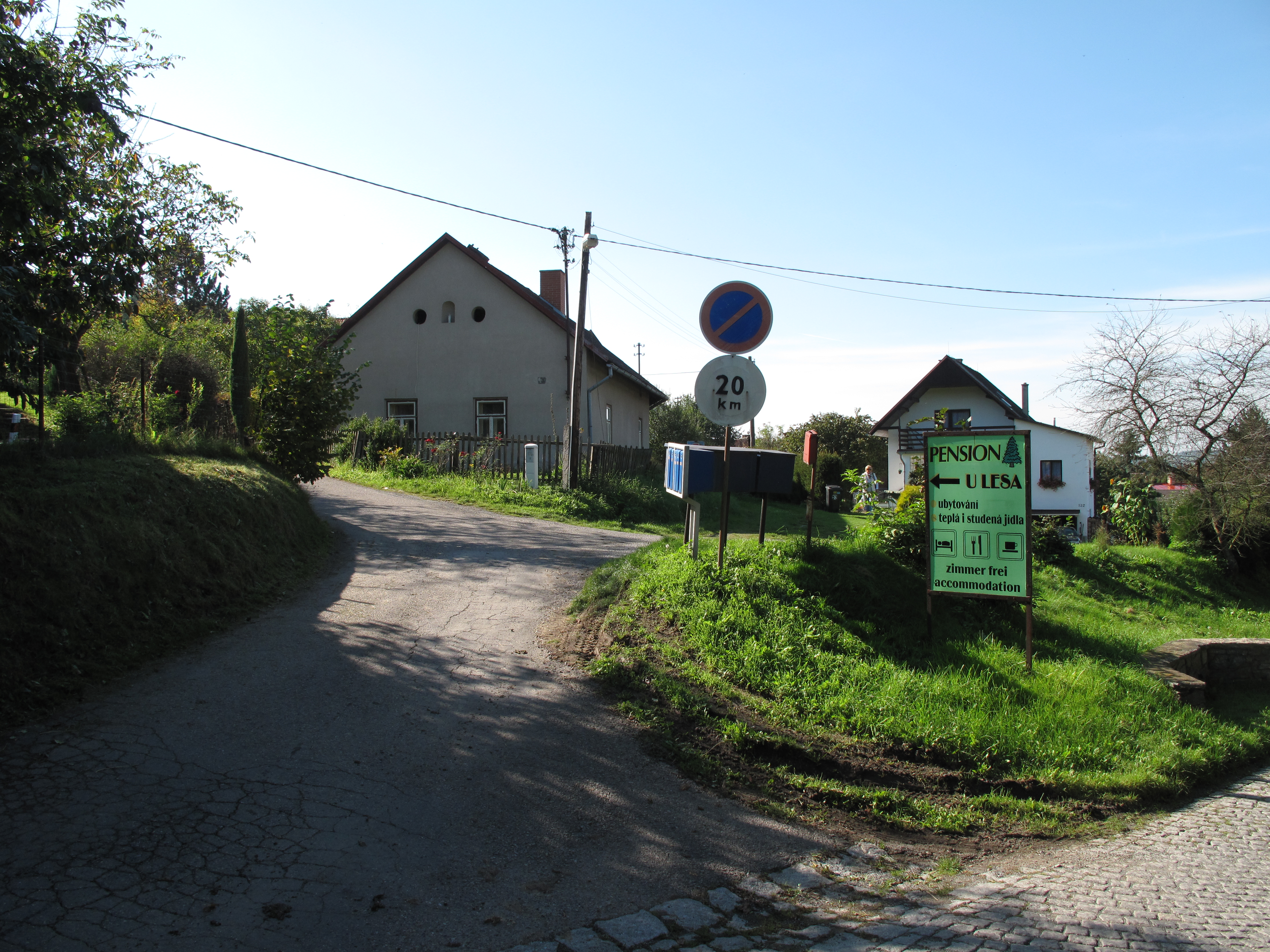 Ubytování v Měříně. Okres Benšov, Česká republika.